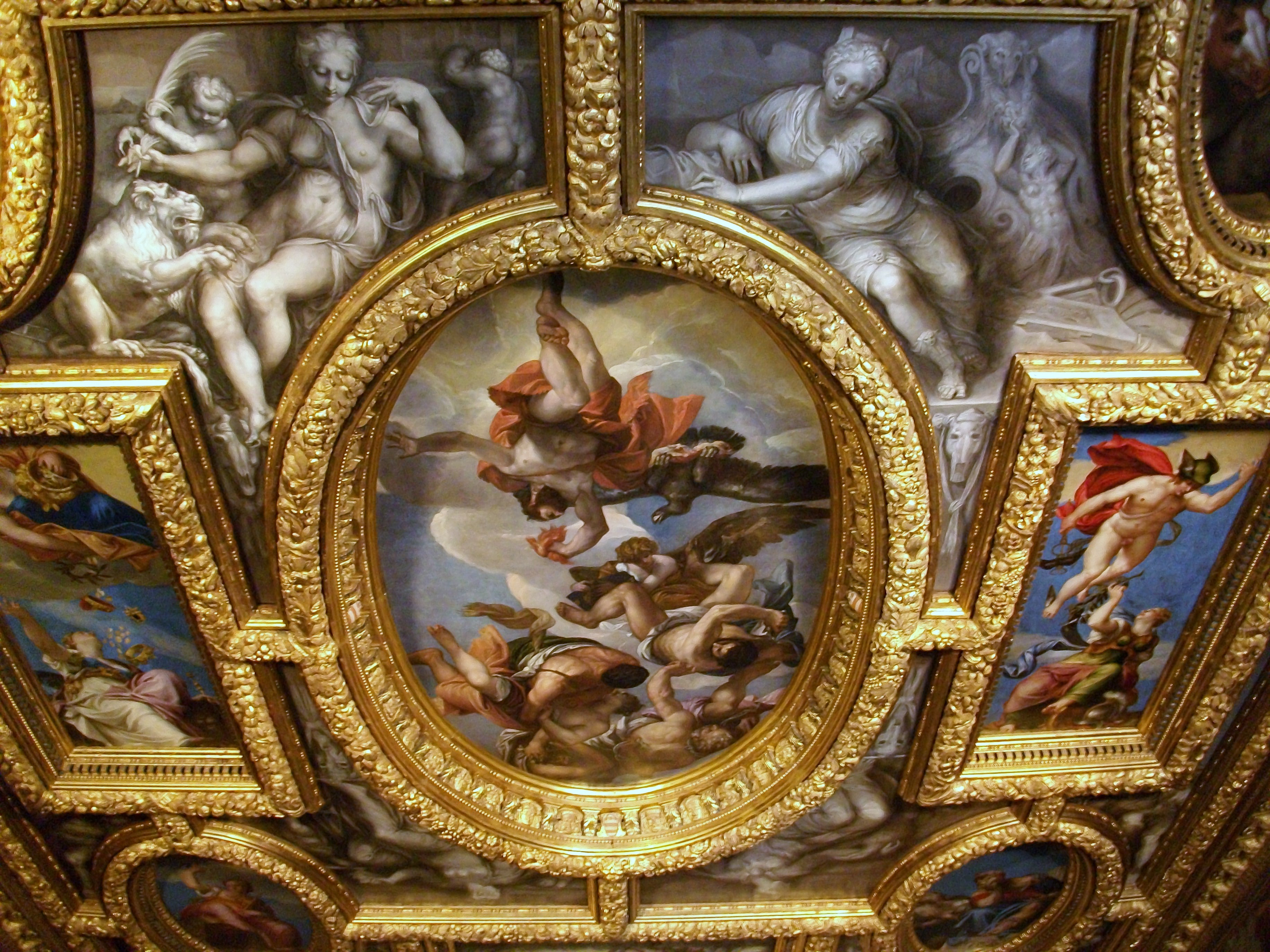 Sostre de la Sala del Consiglio dei Dieci - Palau Ducal de Venècia.